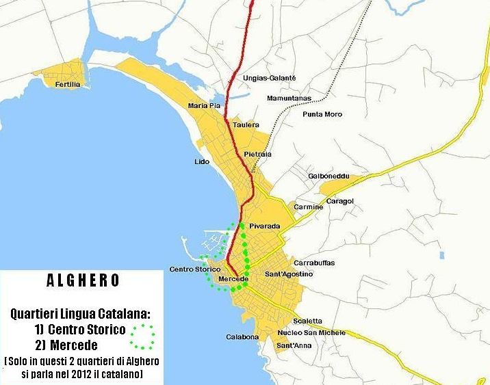 Mappa dei quartieri di Alghero (Sardegna) dove si parla in Catalano arcaico nel 2012 (in verde racchiusi i quartieri "Centro Storico" e "Mercede"). In tutti gli altri quartieri di Alghero si parla il Sardo sassarese. Va notato che nel 2012 solo il 20% dei 40000 abitanti di Alghero parla il Catalano e che tra i giovani in eta' scolastica questa percentuale scende al 12% del totale. La mappa originale viene da Commos wikipedia: File:Quartieri Alghero.jpg